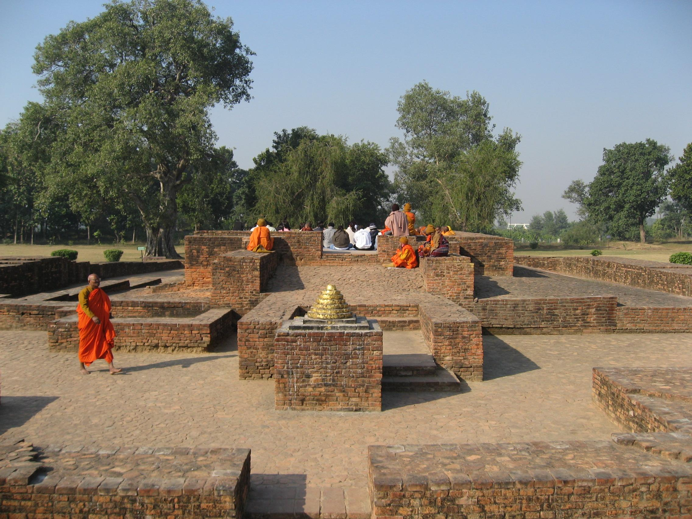 Gandhakuti in Jetavana, Sravasti, Uttar Pradesh, India.